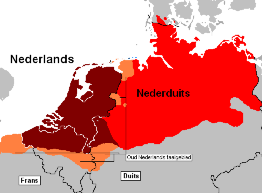 Eigen kaart